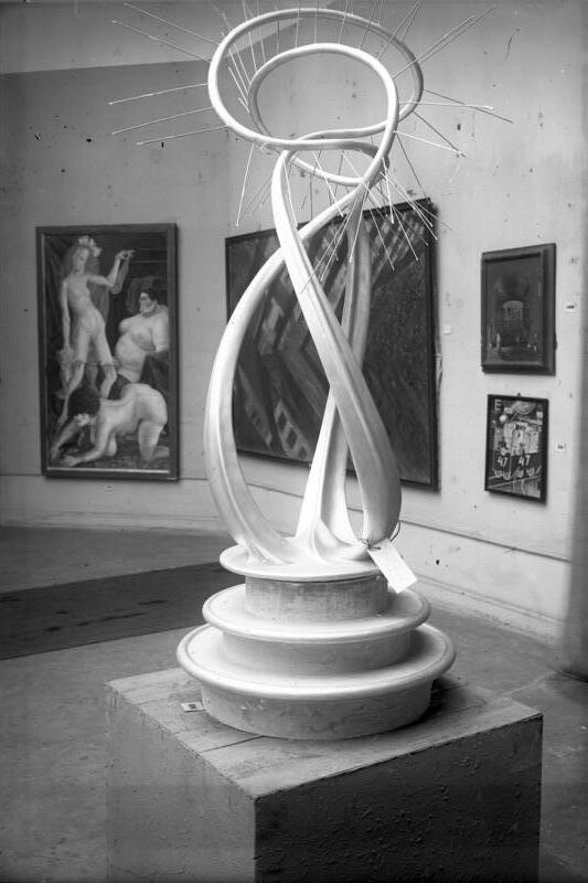 Die Eröffnung der grossen juryfreien Kunst-Ausstellung am Lehrter Bahnhof in Berlin! Ein Brunnen-Detail von Oswald Herzog, Berlin, auf der Ausstellung.